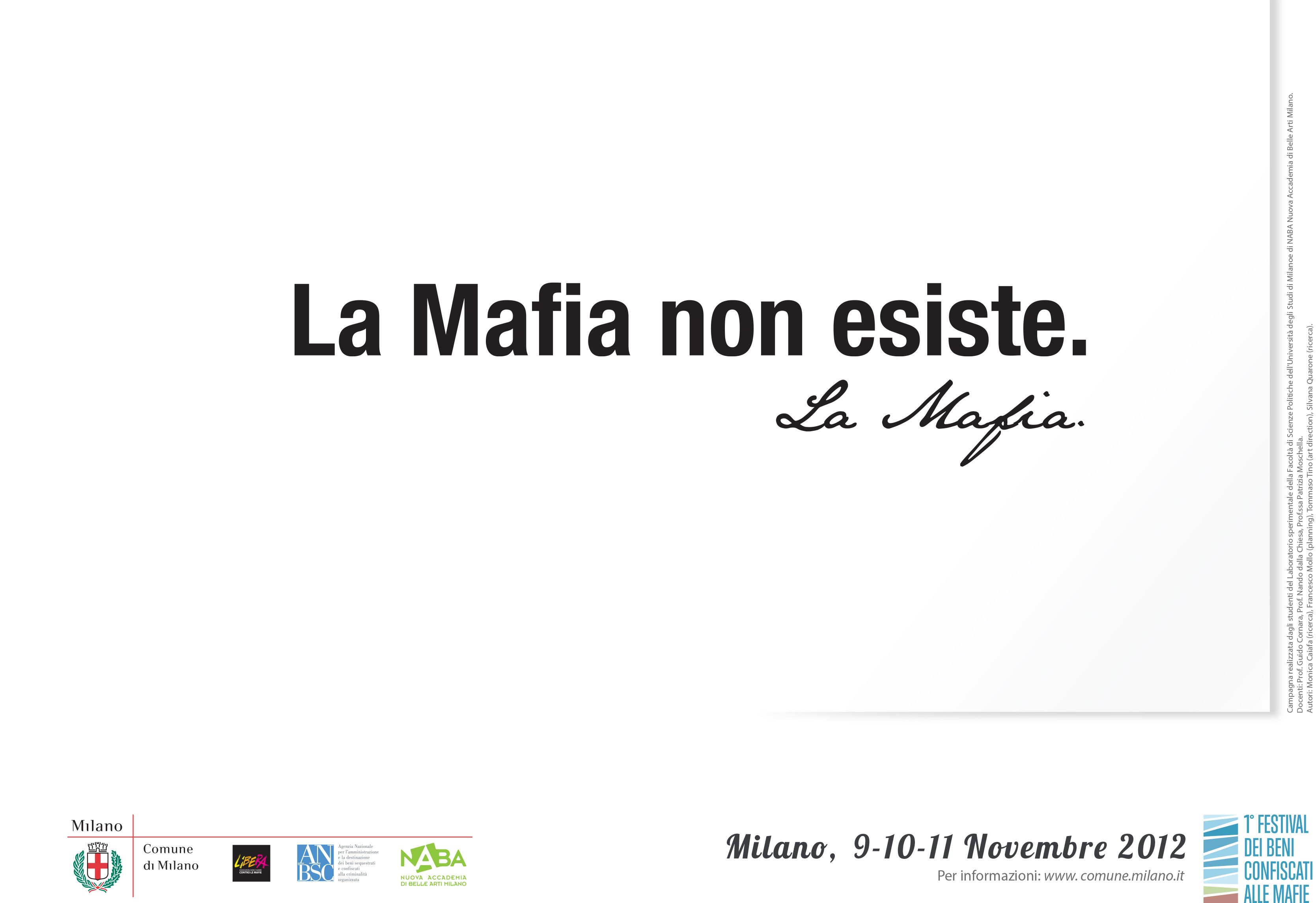 Primo manifesto realizzato dei ragazzi della NABA per il lancio dell'iniziativa